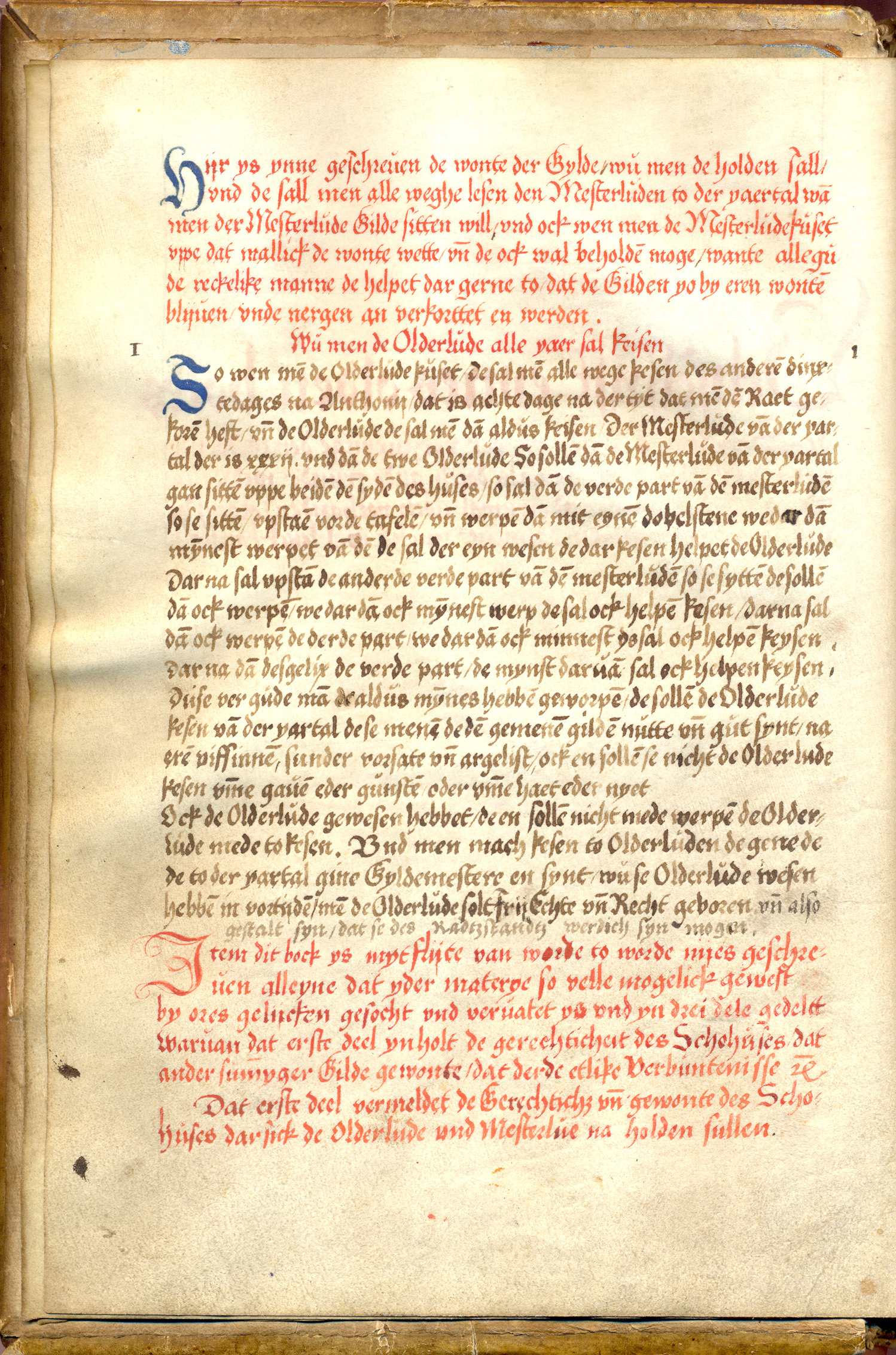 A XI 53 Rotes Buch der Gilden, Stadtarchiv Münster